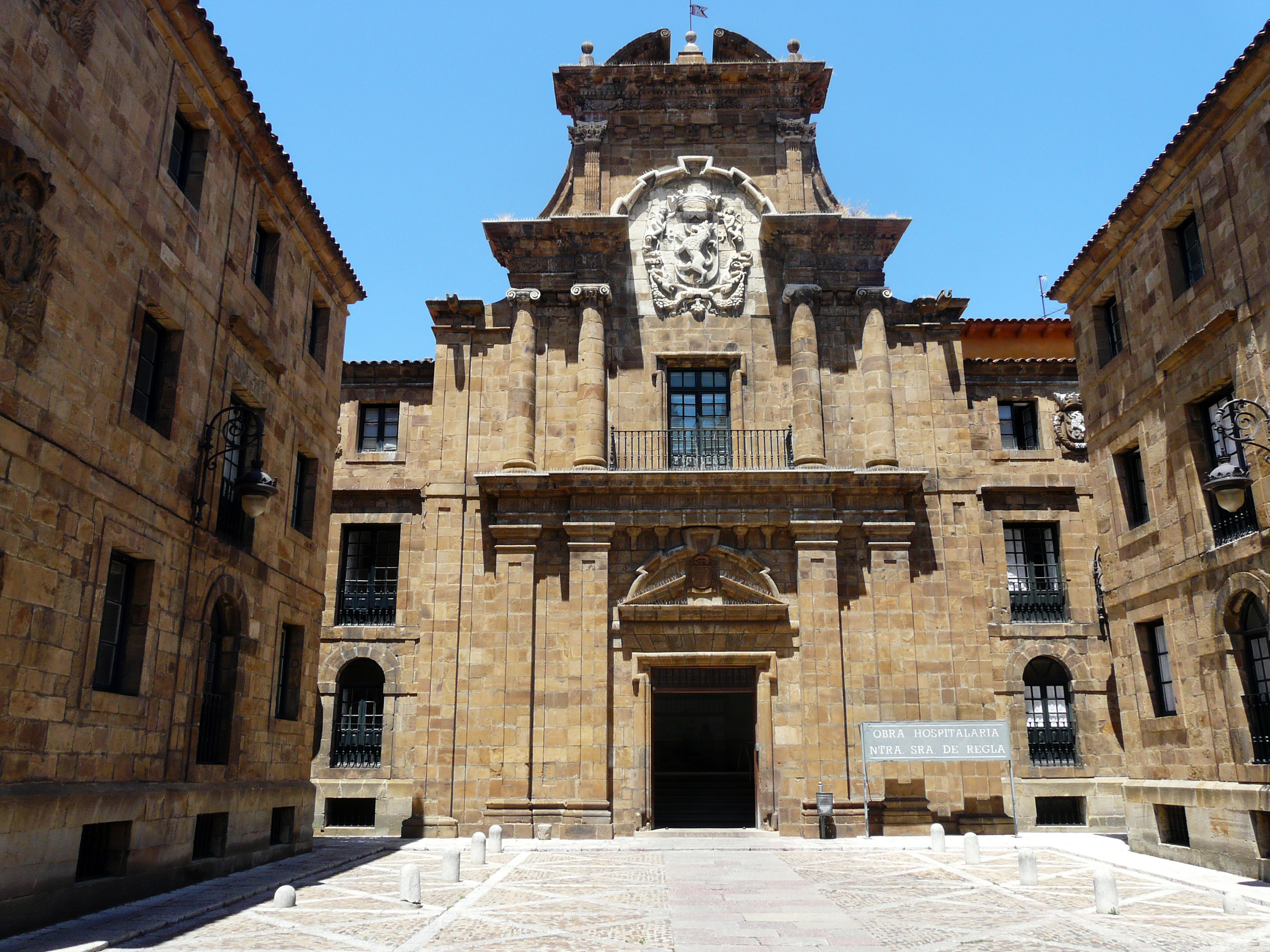 Palacio de los marqueses de Prado, León